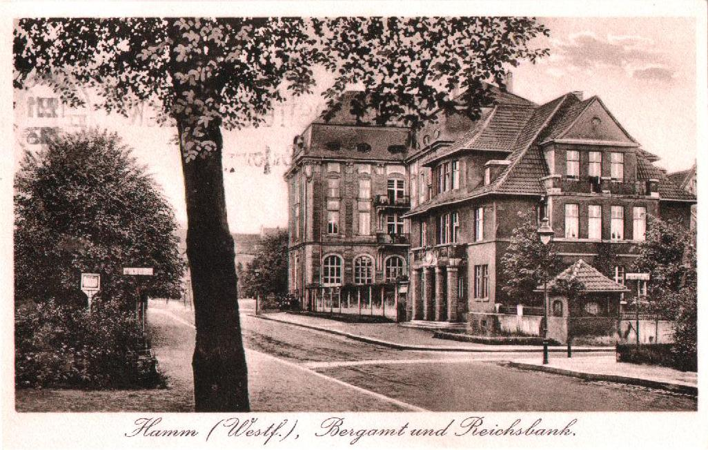 Reichsbank und Bergamt in Goethestraße in Hamm, ca.1930 (Poststempel von 1931)